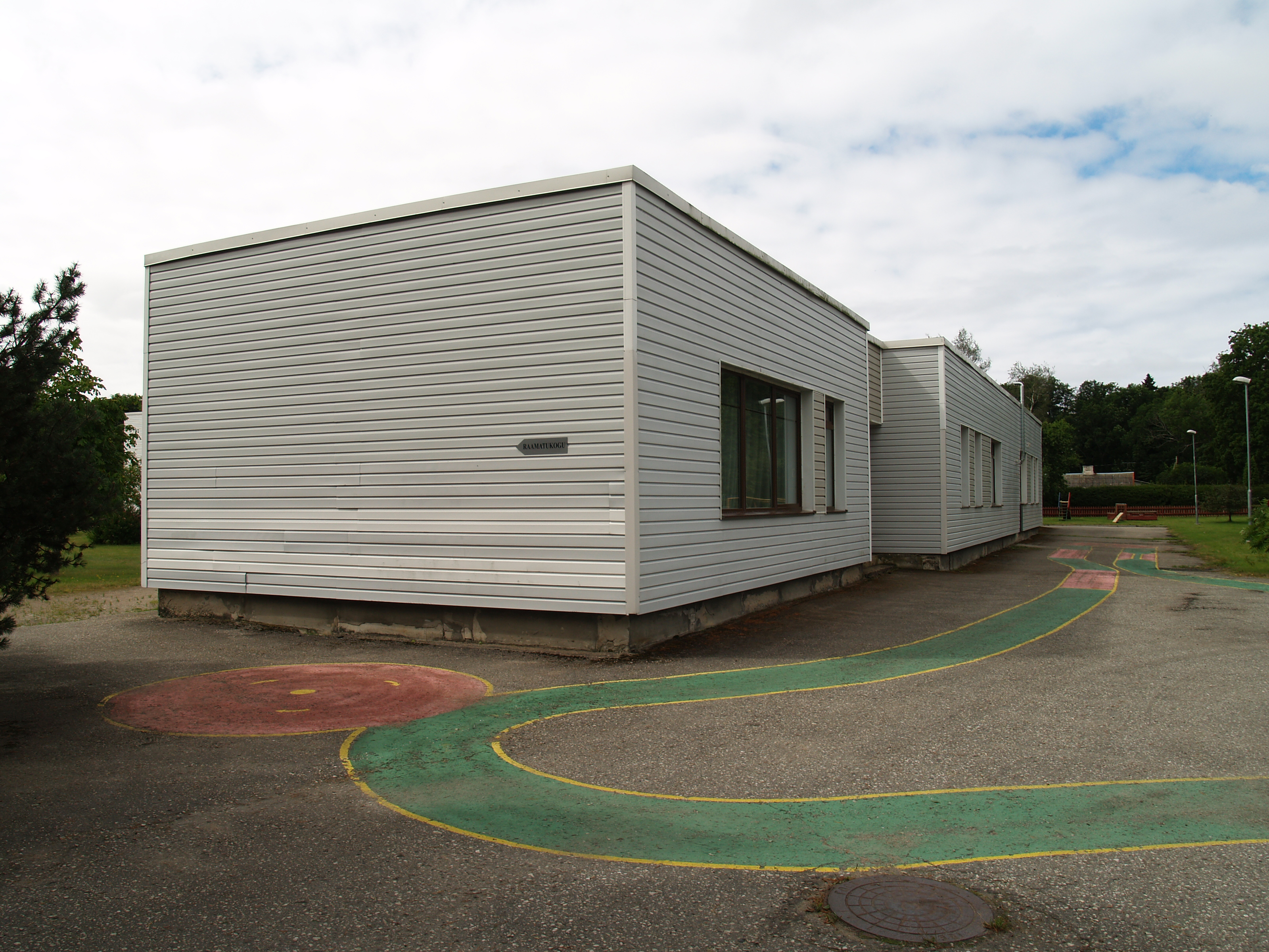 Häädemeeste Lasteaed